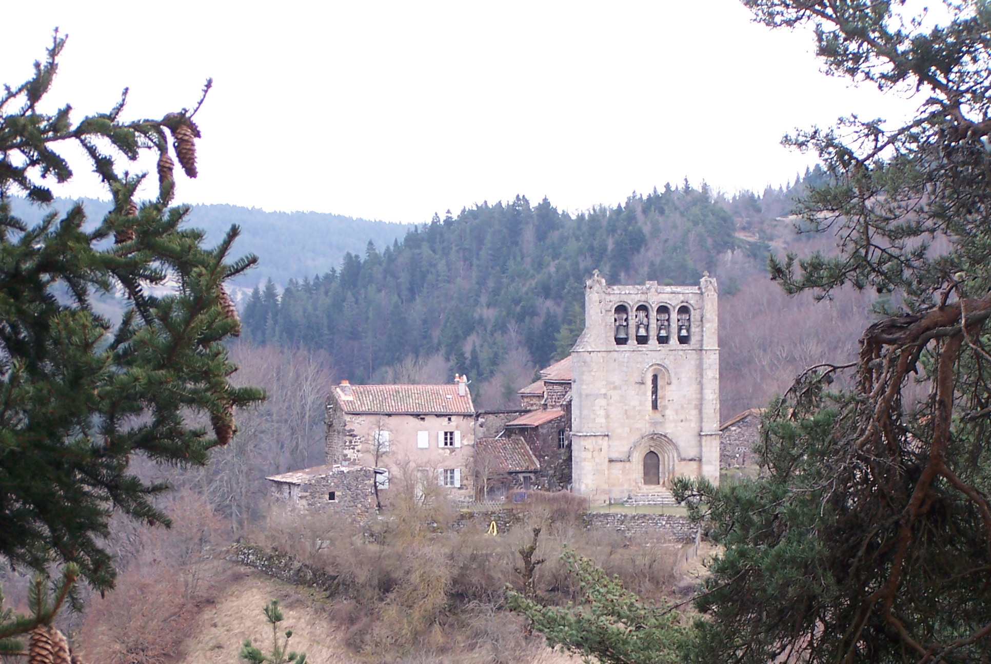 Église Notre-Dame-de-l'Assomption de Saint-Arcons-de-Barges .